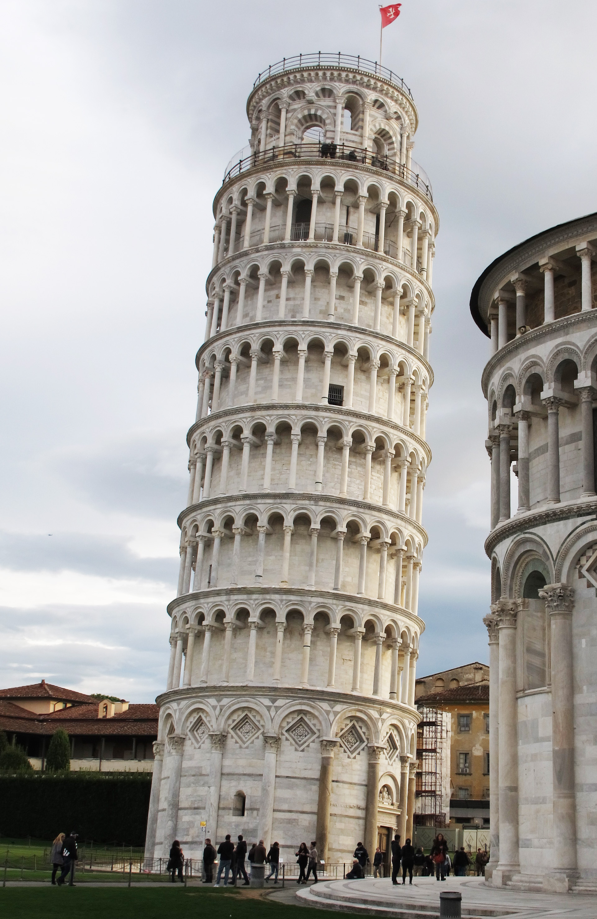 Tour de Pise, Italie